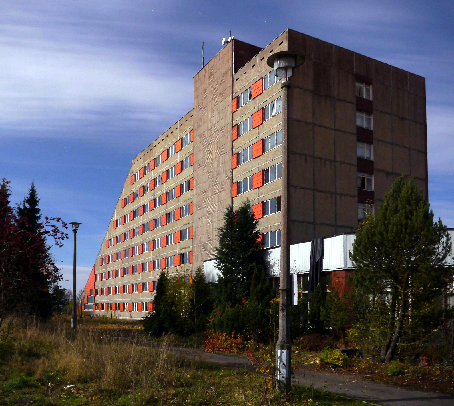 Ehemaliges Skihotel der NVA in Frauenwald am Rennsteig